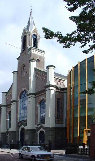 Door Moriko Kira gerestaureerde Remonstrantse kerk van Groningen.